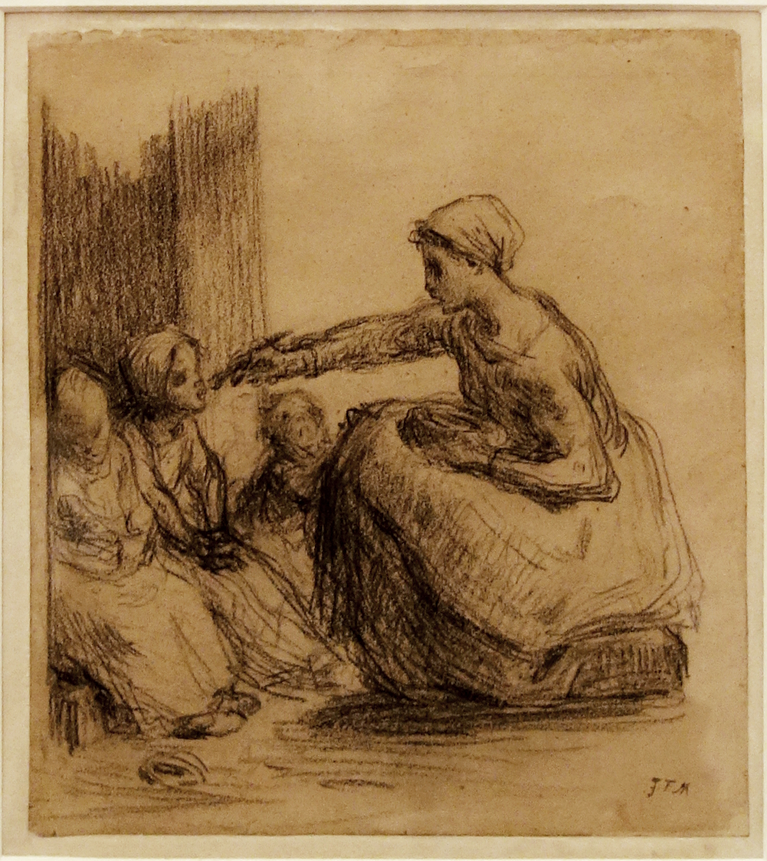 La Becquée